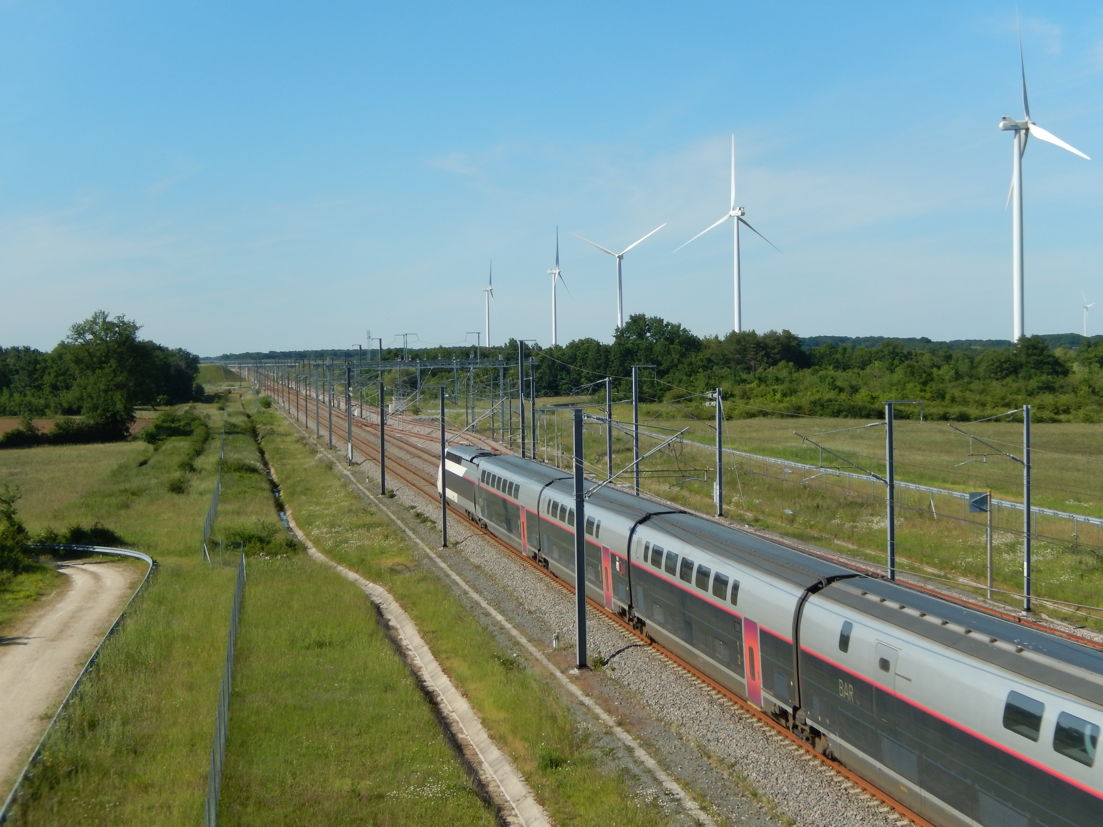 La ligne ferroviaire à grande vitesse Sud-Europe-Atlantique, à hauteur de Pliboux, dans les Deux-Sèvres. Un TGV en direction de Paris est visible sur l'image.